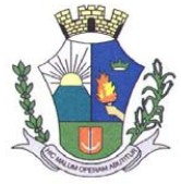 Brasão de Armas do município de Itirapina - SP - Brasil.